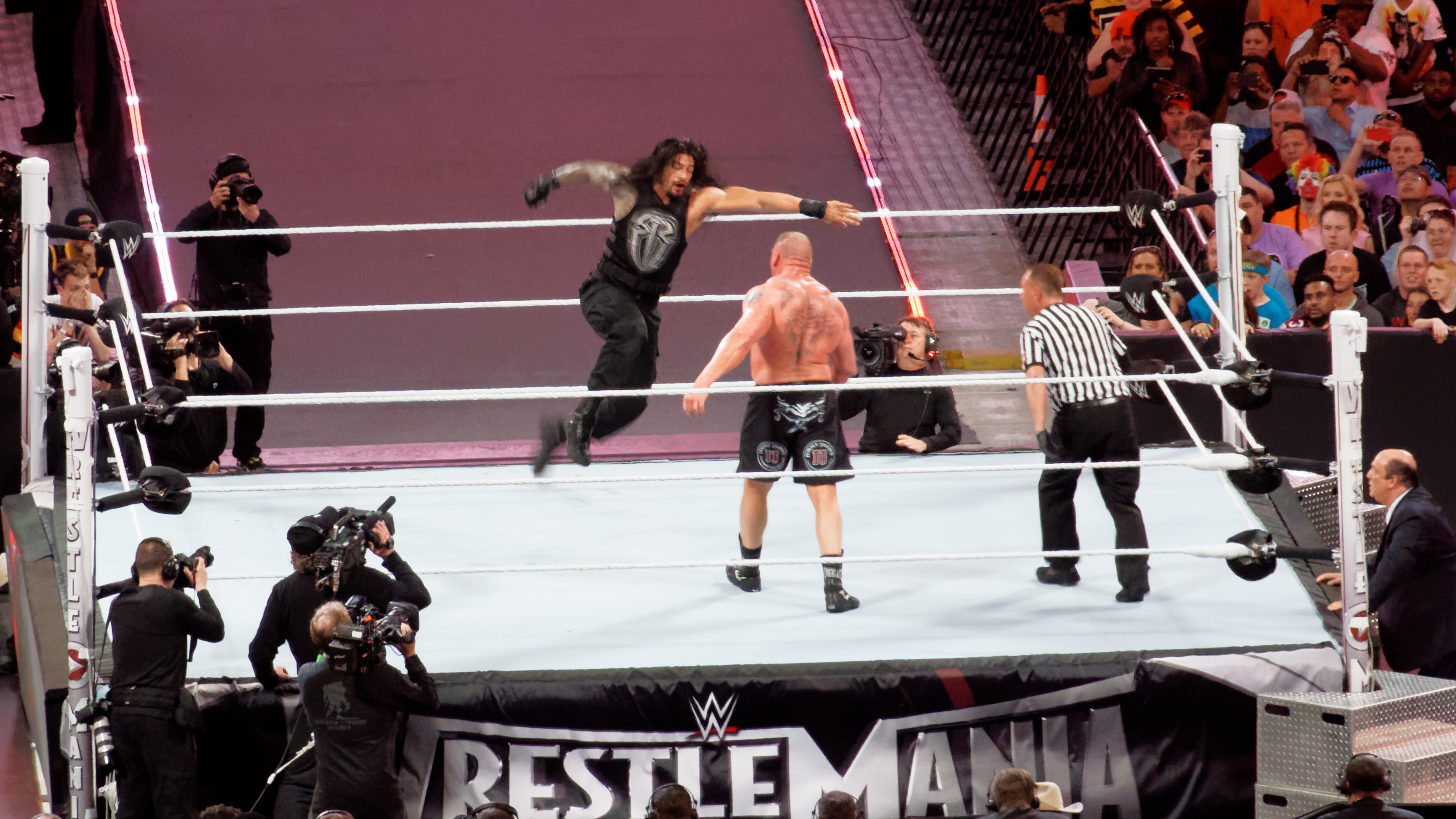 2015-03-29_19-54-22_ILCE-6000_0037_DxO